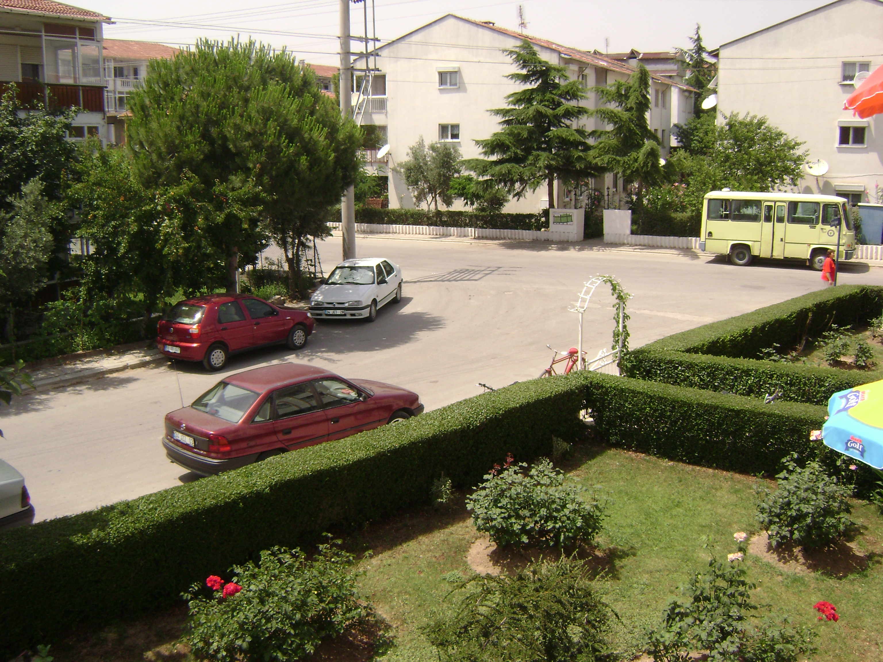 Şarköy, Tekirdağ